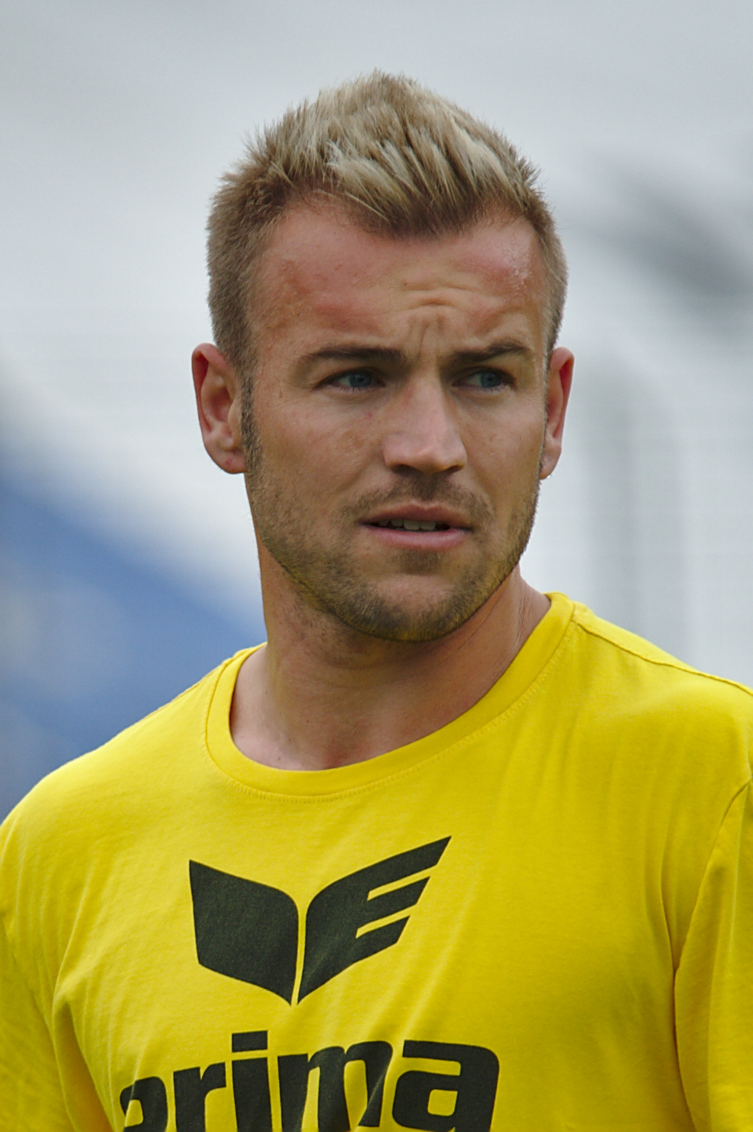 Saisonvorbereitungsspiel Admira Wacker Mödling gegen Kapfenberger SV am 17.6.2017, Bild zeigt: David Sencar